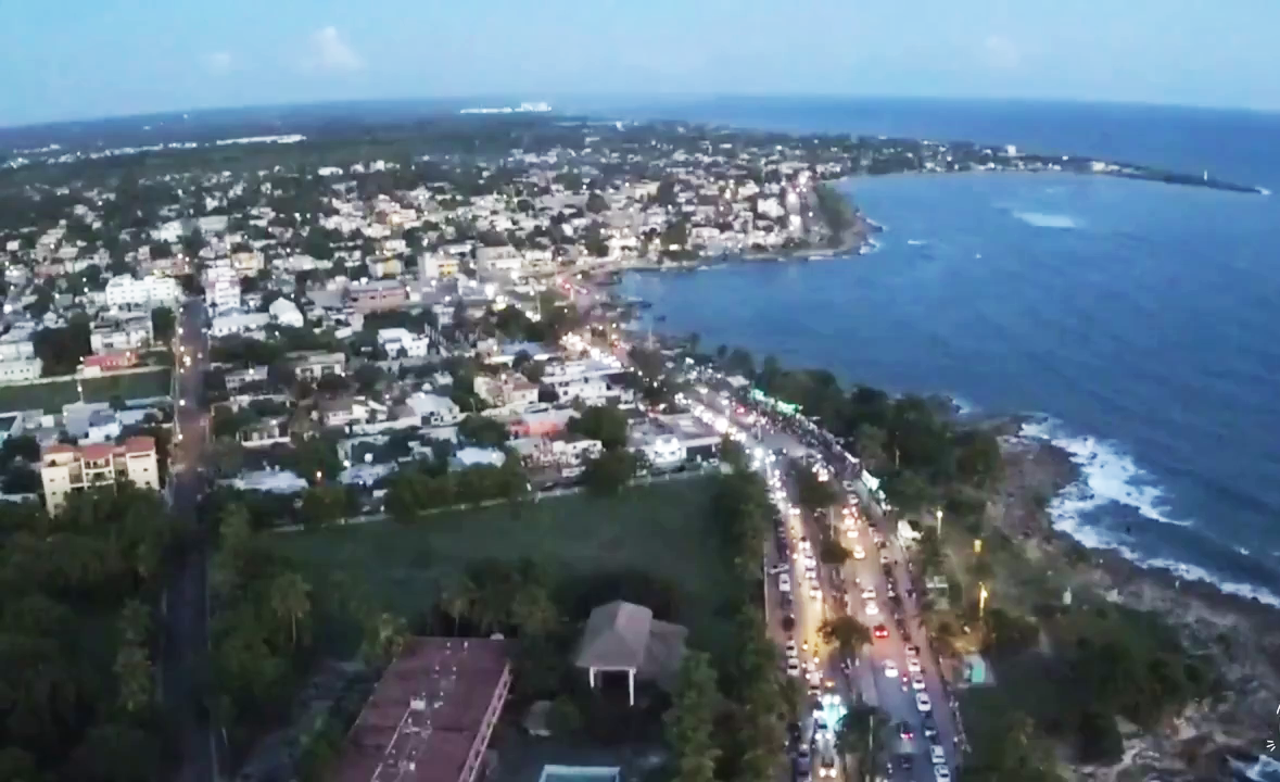 Malecón